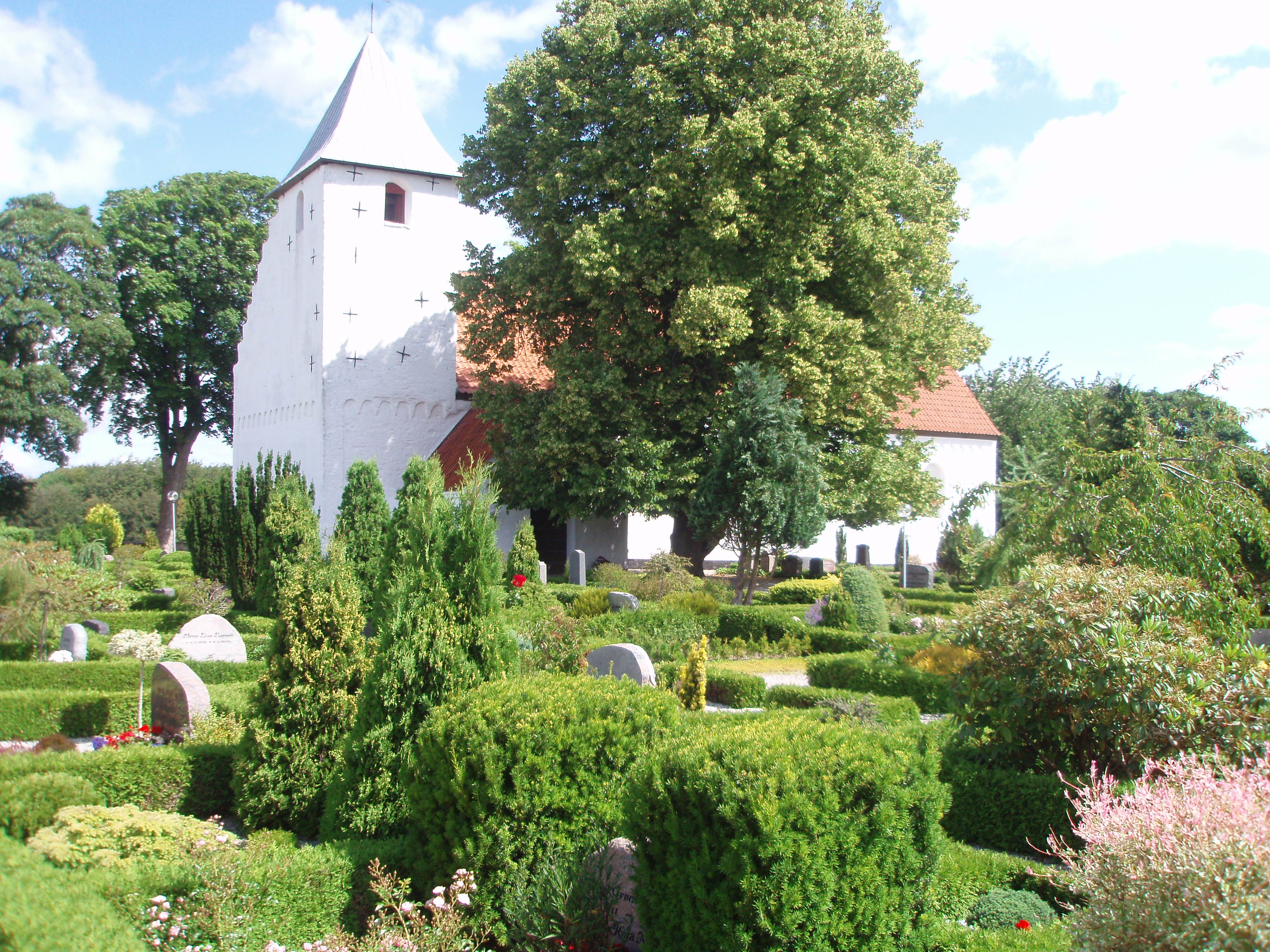 Voerladegård Kirke, Danmark